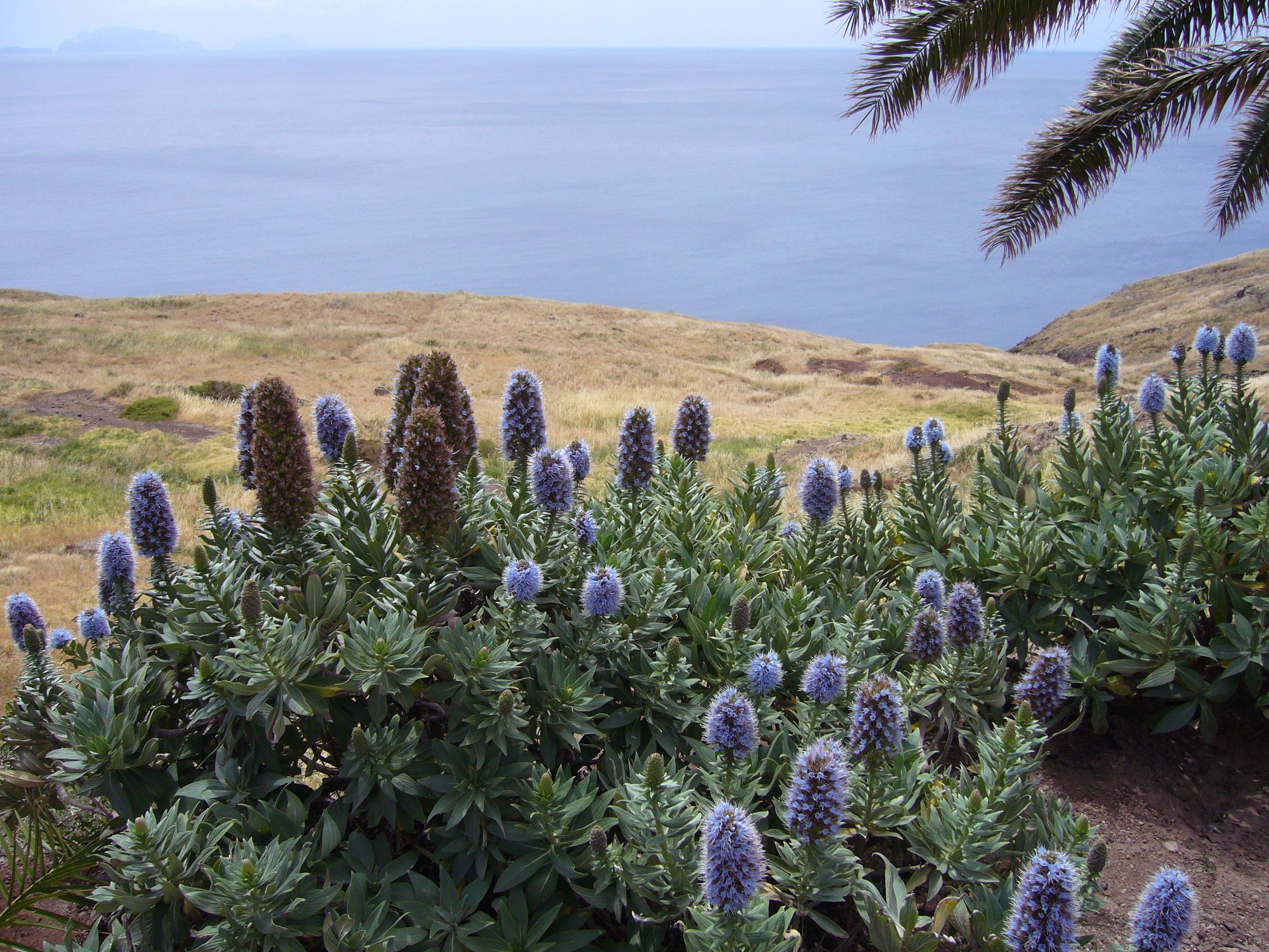 Echium nervosum at Ponta de Săo Lourenço